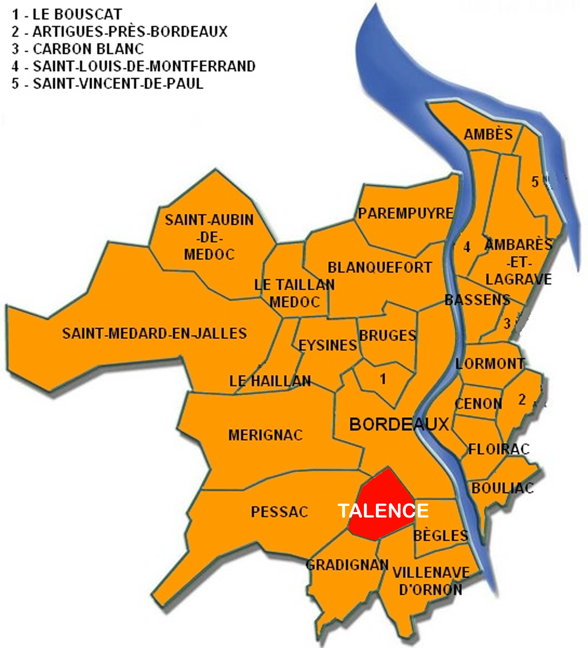 Situation de Talence au sein de la Communauté urbaine de Bordeaux (CUB) / Location of Talence in the Urban Community of Bordeaux (CUB)